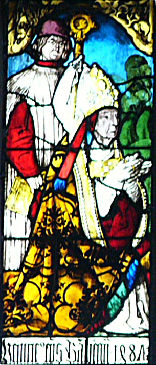 Fenster des Bischofs von Bamberg: Darstellung von Heinrich III. Groß von Trockau